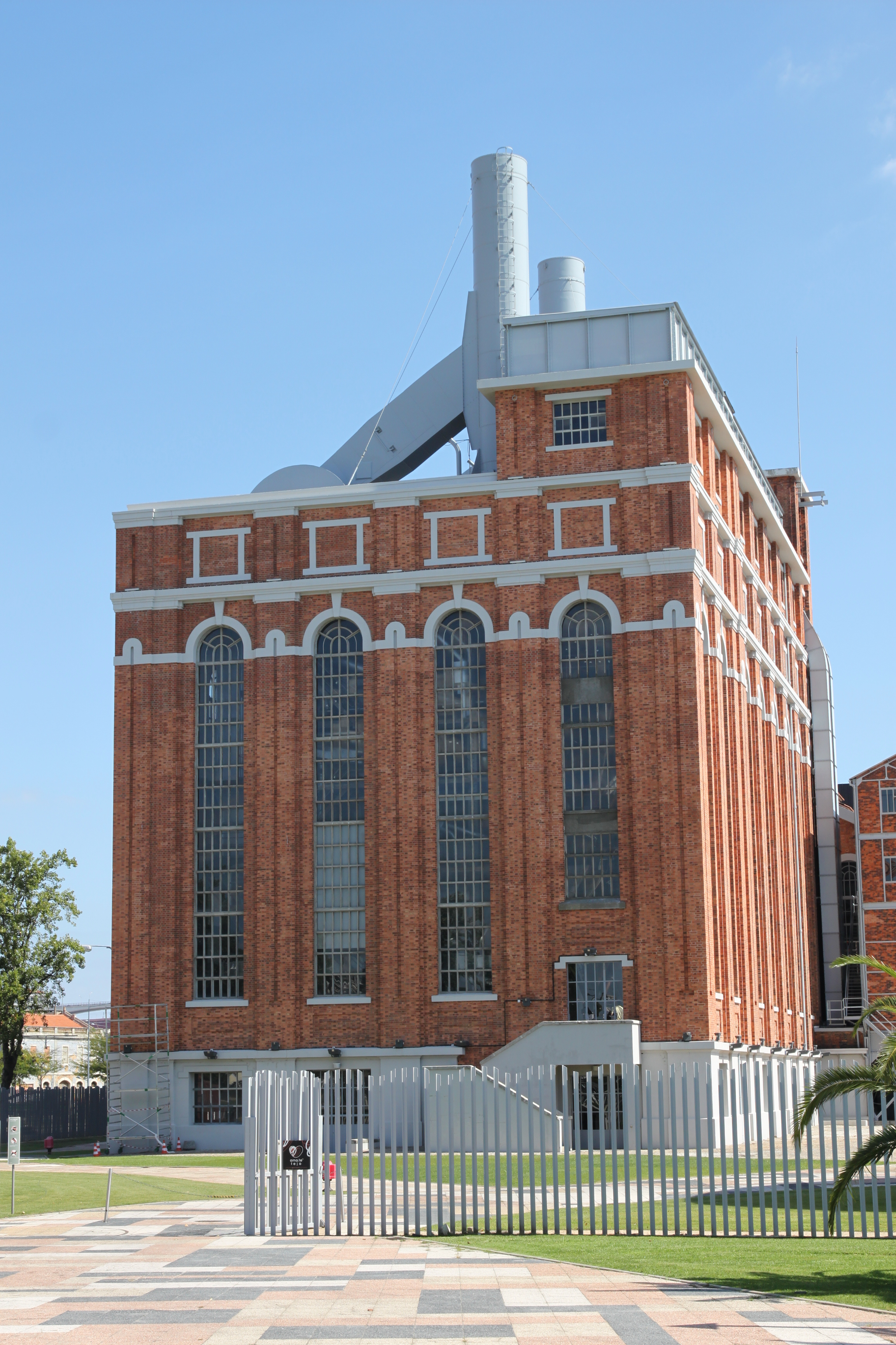 Central Tejo This file was uploaded for Wiki Loves Monuments in Portugal with the unique identifier 73123.